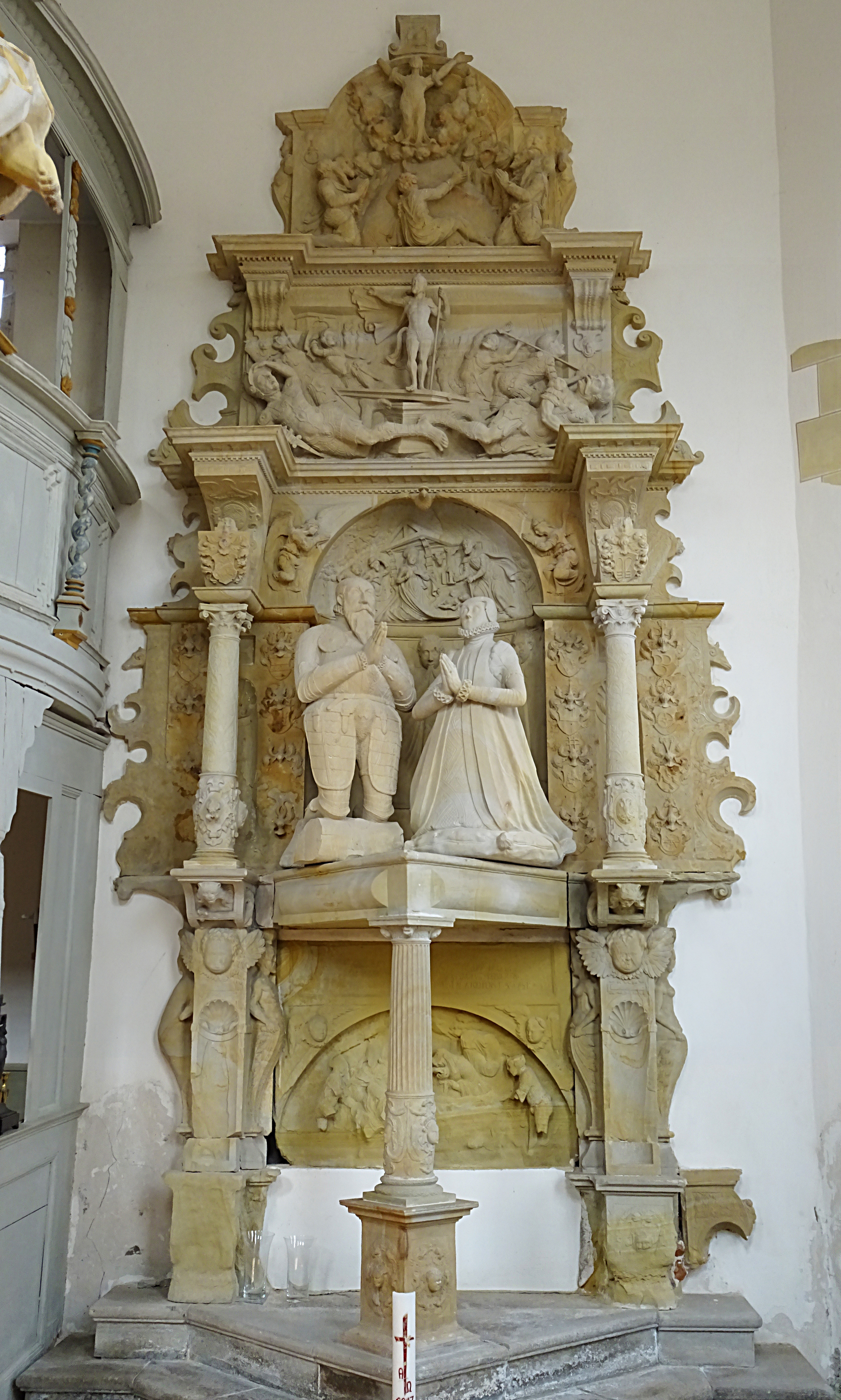 der Epitaph des kursächsischen Rats Phillipp von Werthern und seiner Frau Anna wurde um 1580 von der Erfurter Steinmetzfamilie Friedemann aus gelbem Sandstein geschaffen[1]